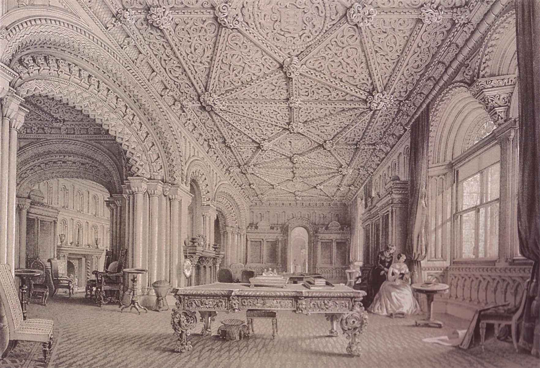 Lithografie der Bibliothek von Penrhyn Castle